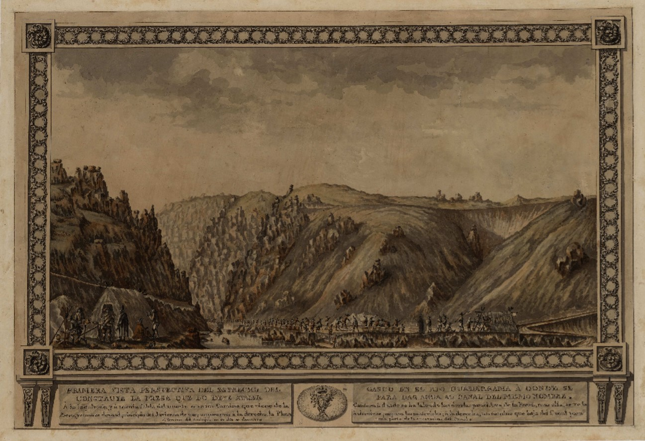 Dibujo del siglo XVIII en el que se representan las obras de la Presa de El Gasco, edificada sobre el monte homónimo, sobre el río Guadarrama, en la confluencia de los términos municipales de Torrelodones, Las Rozas y Galapagar (Comunidad de Madrid, España). Se trata de un dibujo sobre papel verjurado ocre pluma, pincel, tinta y aguadas grises y de color. Incluye a pie de imagen una leyenda manuscrita a pluma y tinta negra:PRIMERA VISTA PERSPECTIVA DEL ESTRECHO DEL GASCO EN EL RIO GUADARRAMA Á DONDE SE / CONSTRUYE LA PRESA QUE LO DEVE ATAJAR PARA DAR AGUA AL CANAL DEL MISMO NOMBRE. / Á la izquierda y à media falda del monte se ve un Camino que viene de la / Cantera á donde se ha labrado las dovelas para el Arco de la Presa, mas alla, se ve la / Presa, y como se dexo al principio del Invierno de 1787[tachado]; un poco mas à la derecha, la Plaza / à donde se prepara los materiales ; á la derecha, un camino que baja del Canal para / el Servicio del trabajo, en lo alto se descuvre / una parte de la excavacion del Canal. Se conserva en la Biblioteca Nacional de España (Madrid).